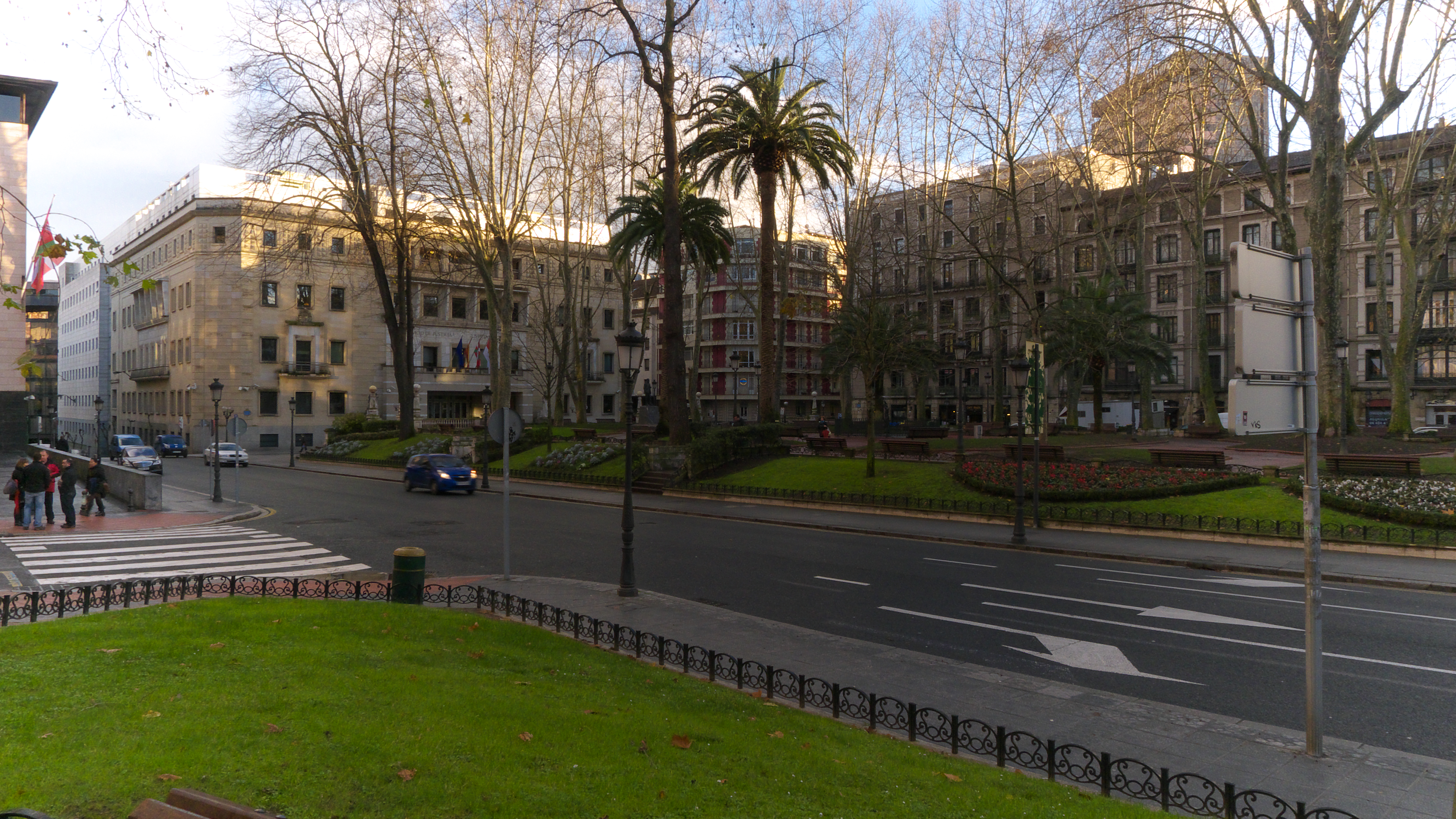 Plaza famosa en la localidad